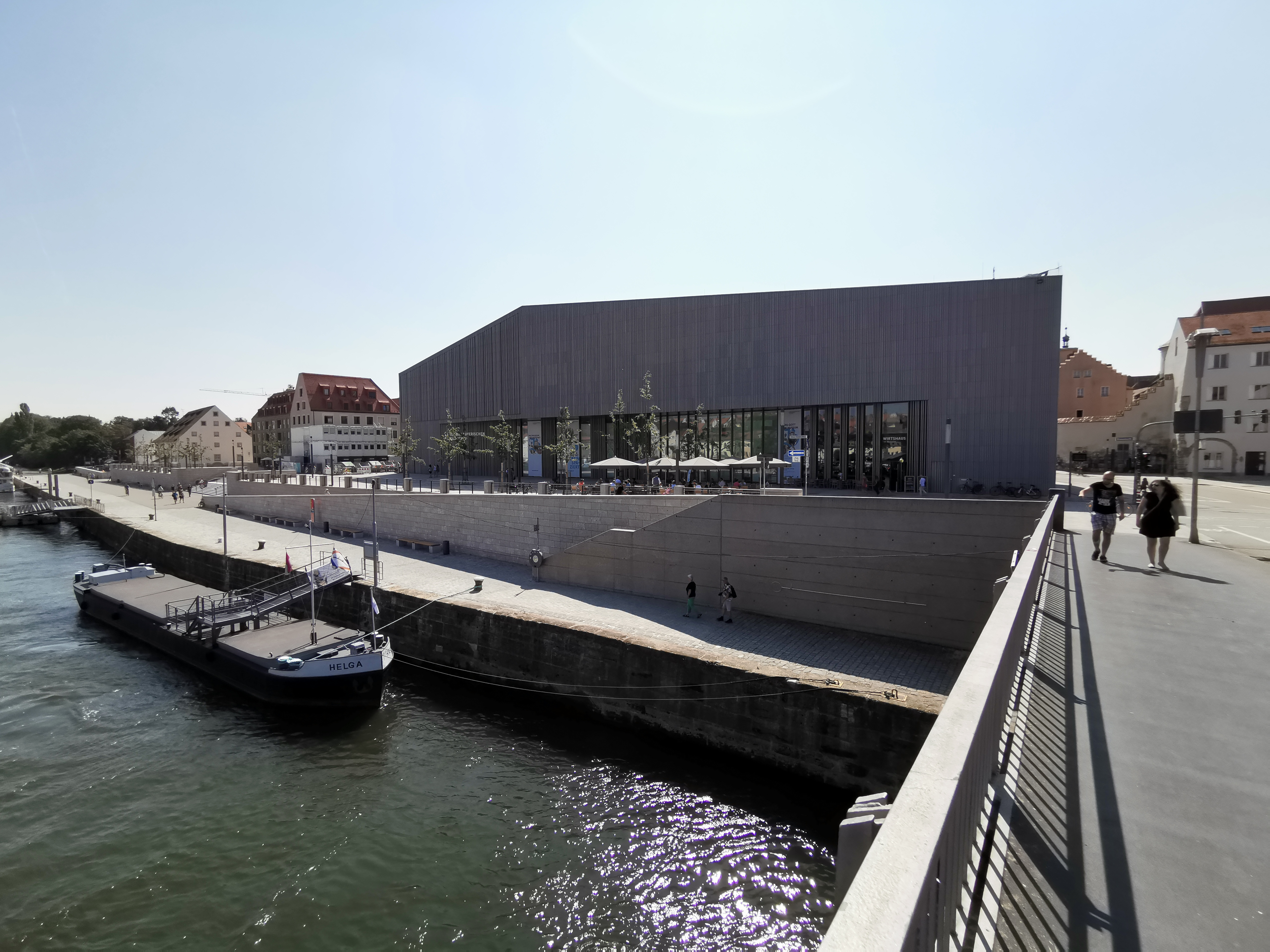 Haus der Bayerischen Geschichte in Regensburg